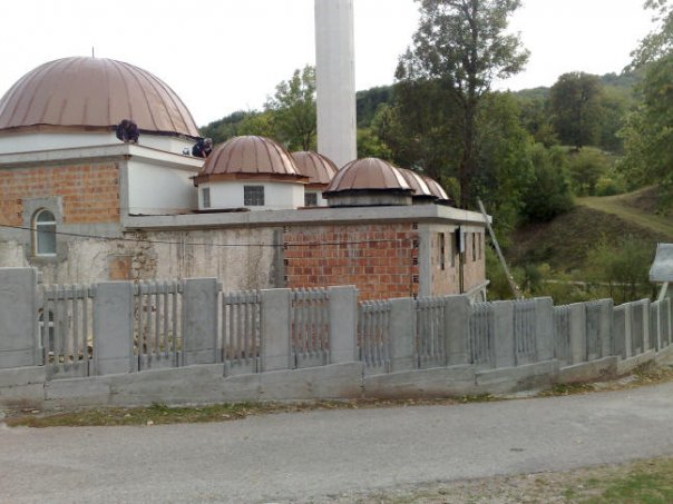 Bjelimići - Džamija u Odžacima